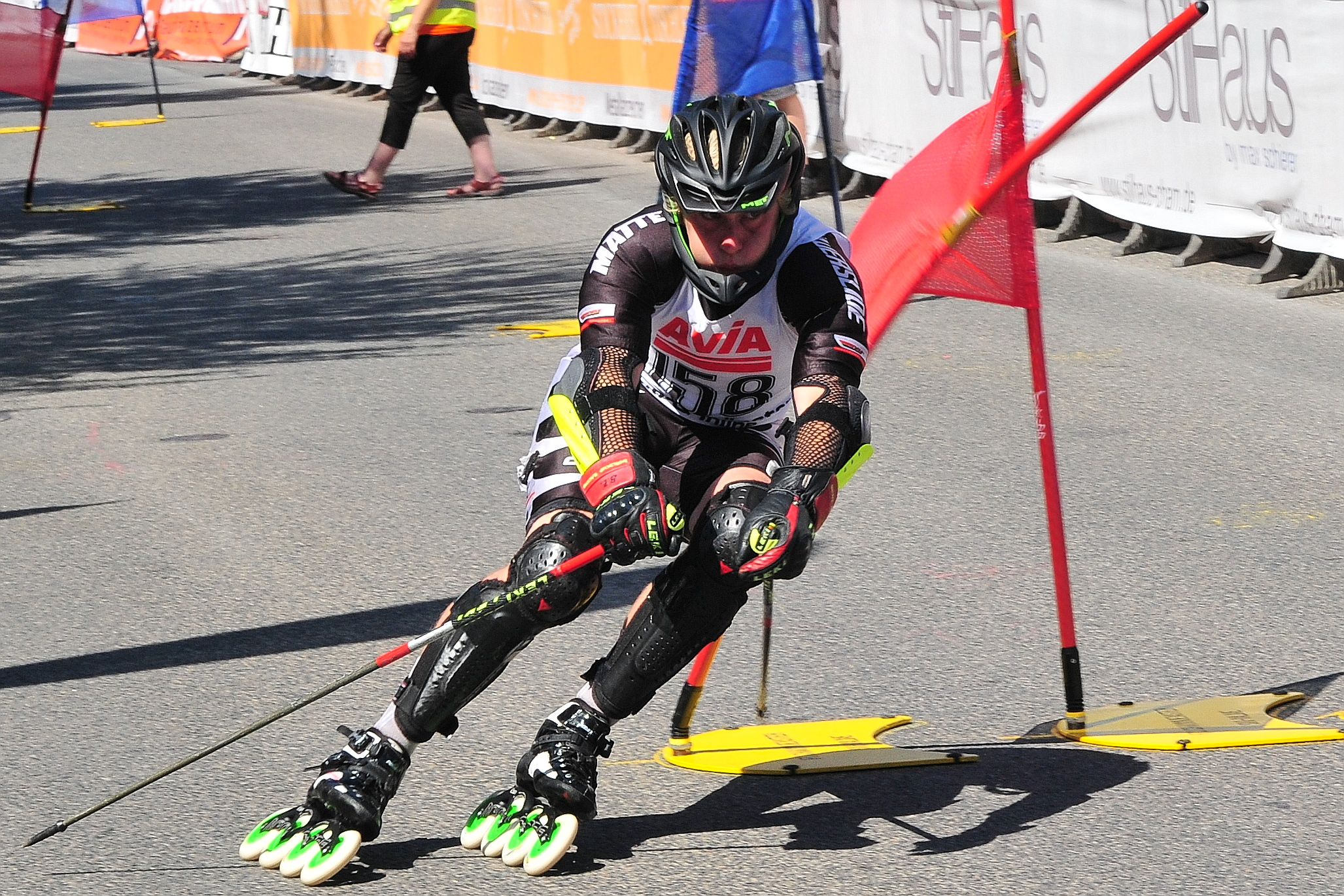 Riesenslalom, DSV Ski-Inline Cup, Zörlein 2012